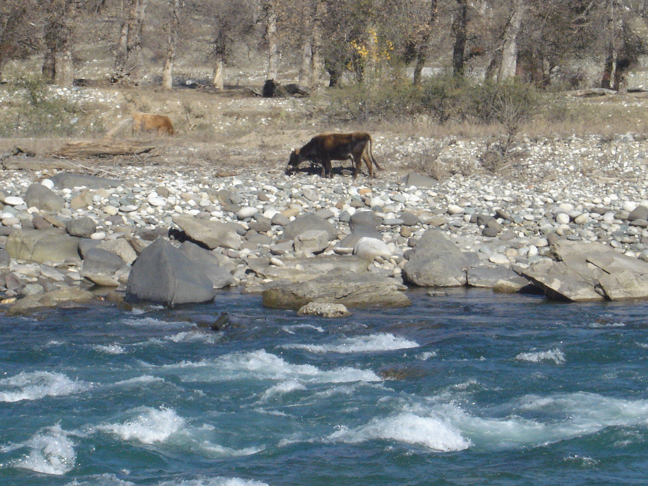 Карачаевск, республика Карачаево-Черкессия, Россия.